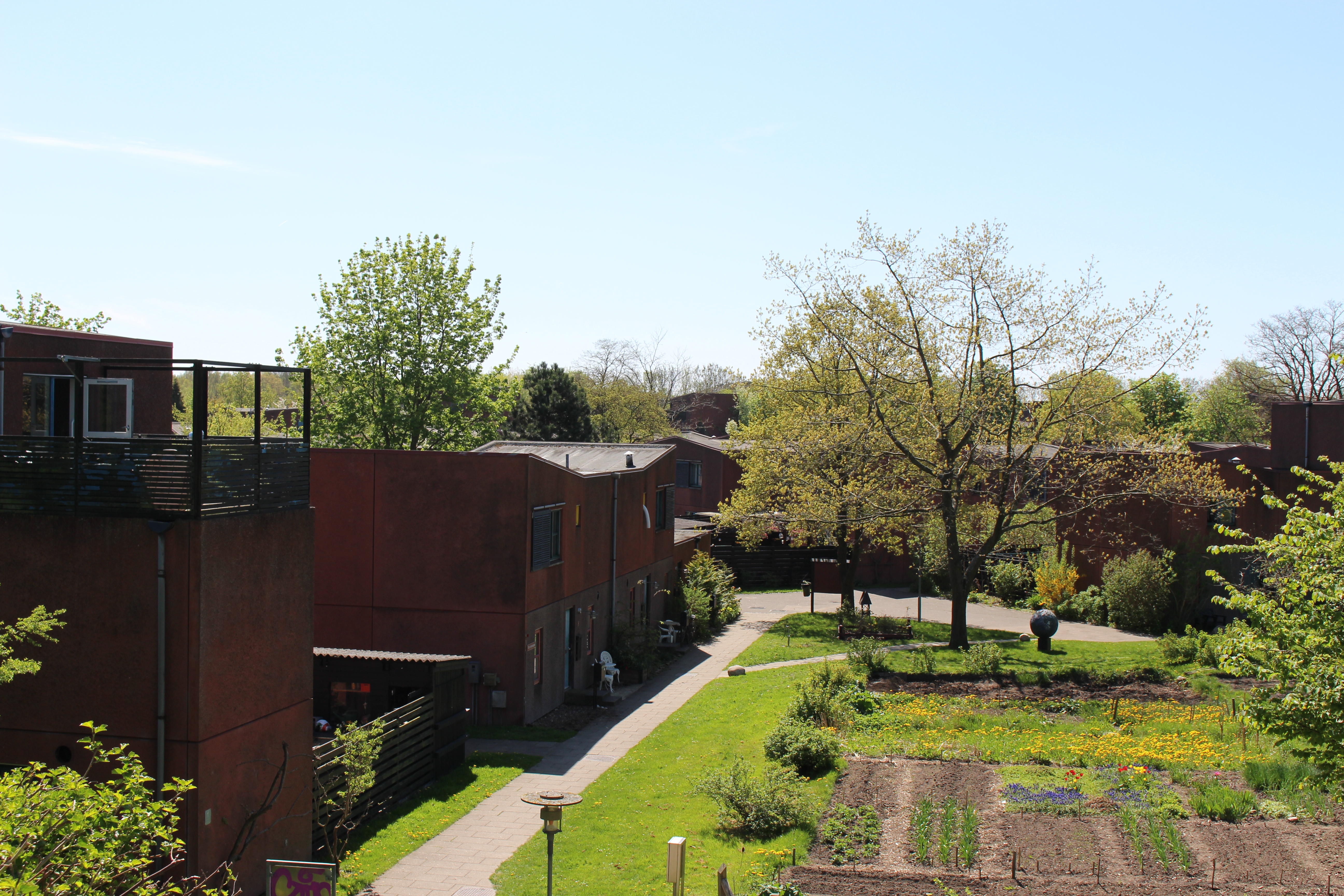 Hyldespjældet i Albertslund